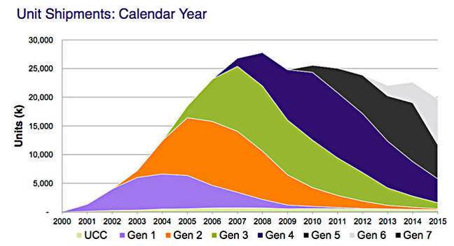 LTO ühikute saadetiste arv aastate lõikes